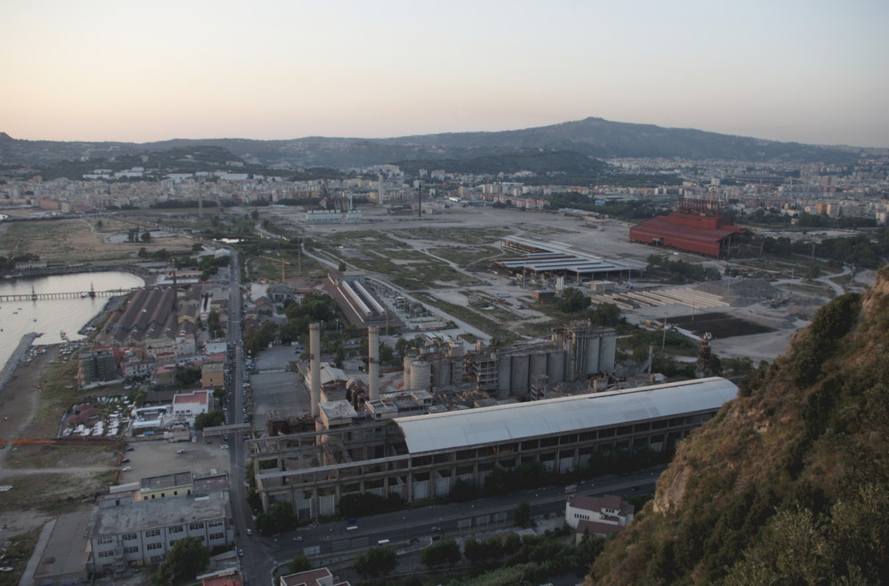 Veduta di quanto resta dell'acciaieria Italsider di Bagnoli (Napoli). Autore foto: Roberto De Martino